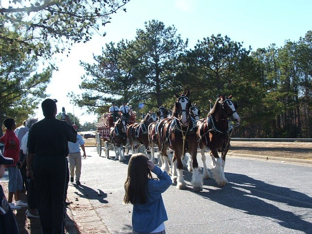 Budweiser Clydesdales Hitch